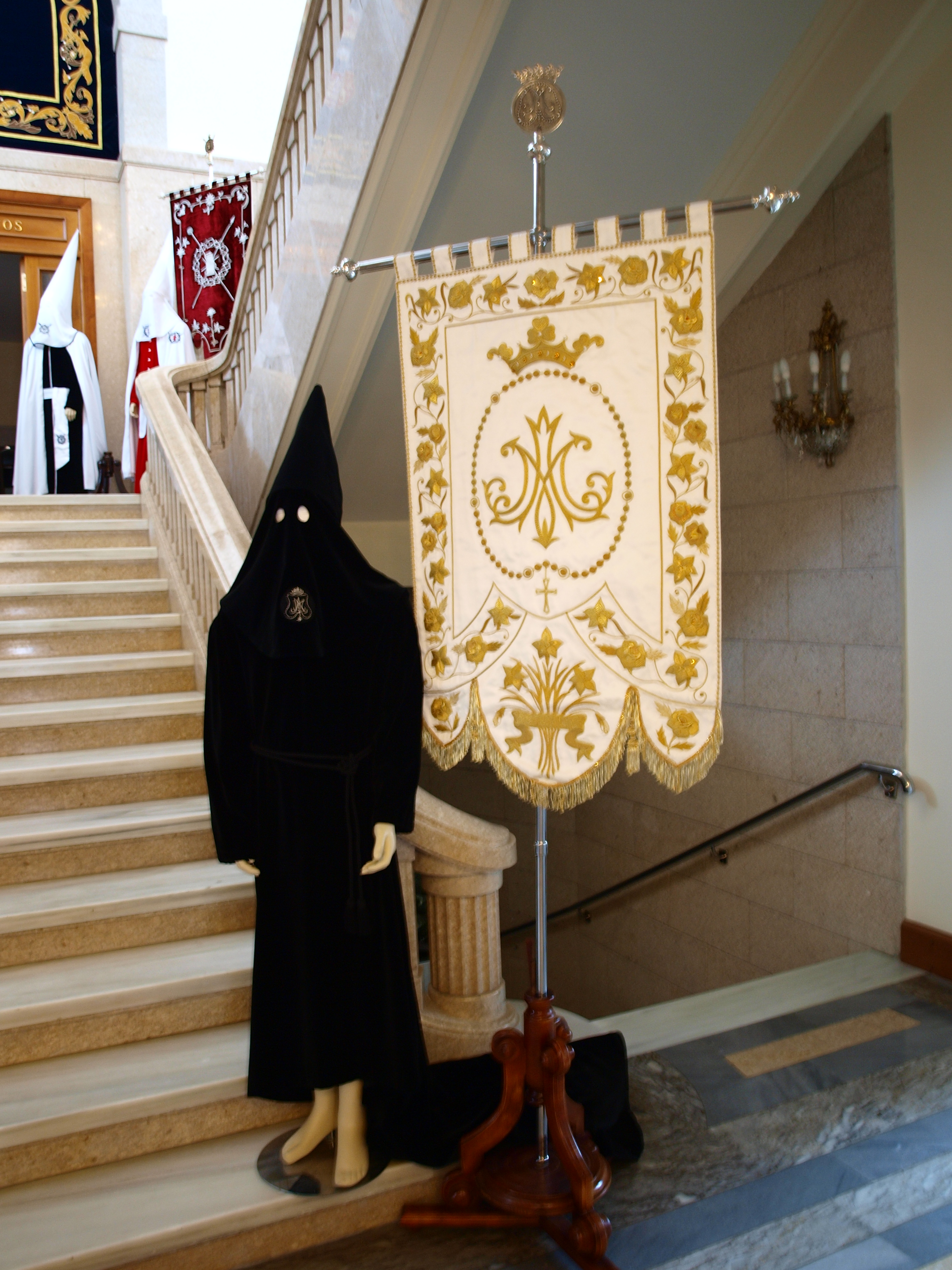 Estandarte y vestimenta de la Cofradía del Rosario